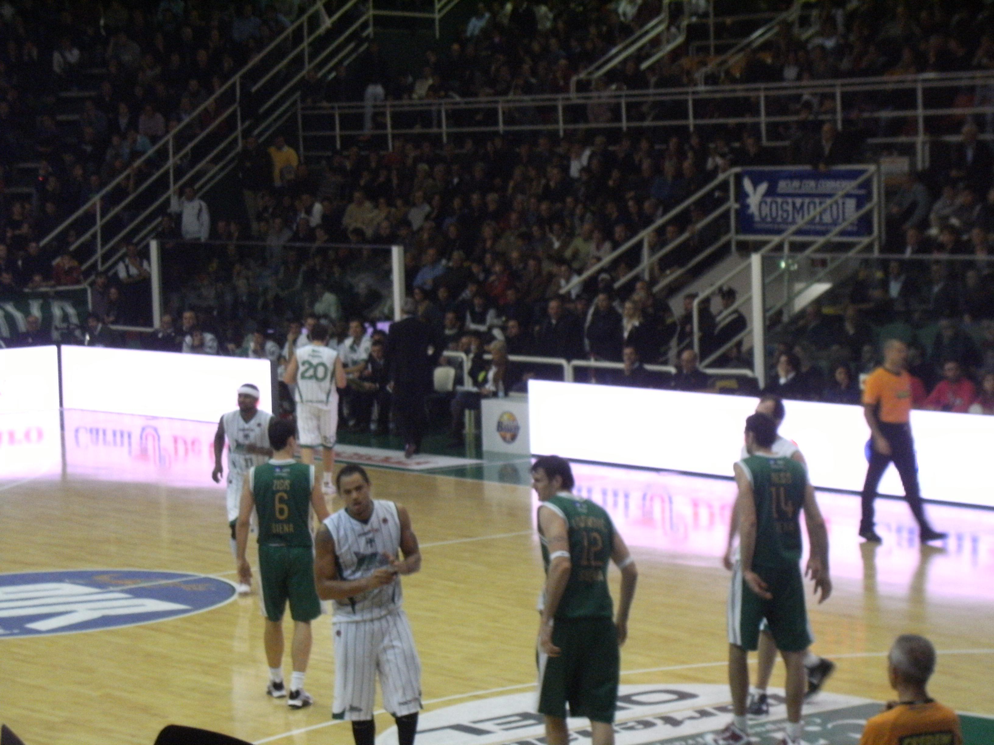 Scandone Avellino-Mens Sana Siena Palasport Giacomo Del Mauro di Avellino / 29 novembre 2009